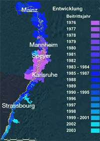 Entwicklung KAPS